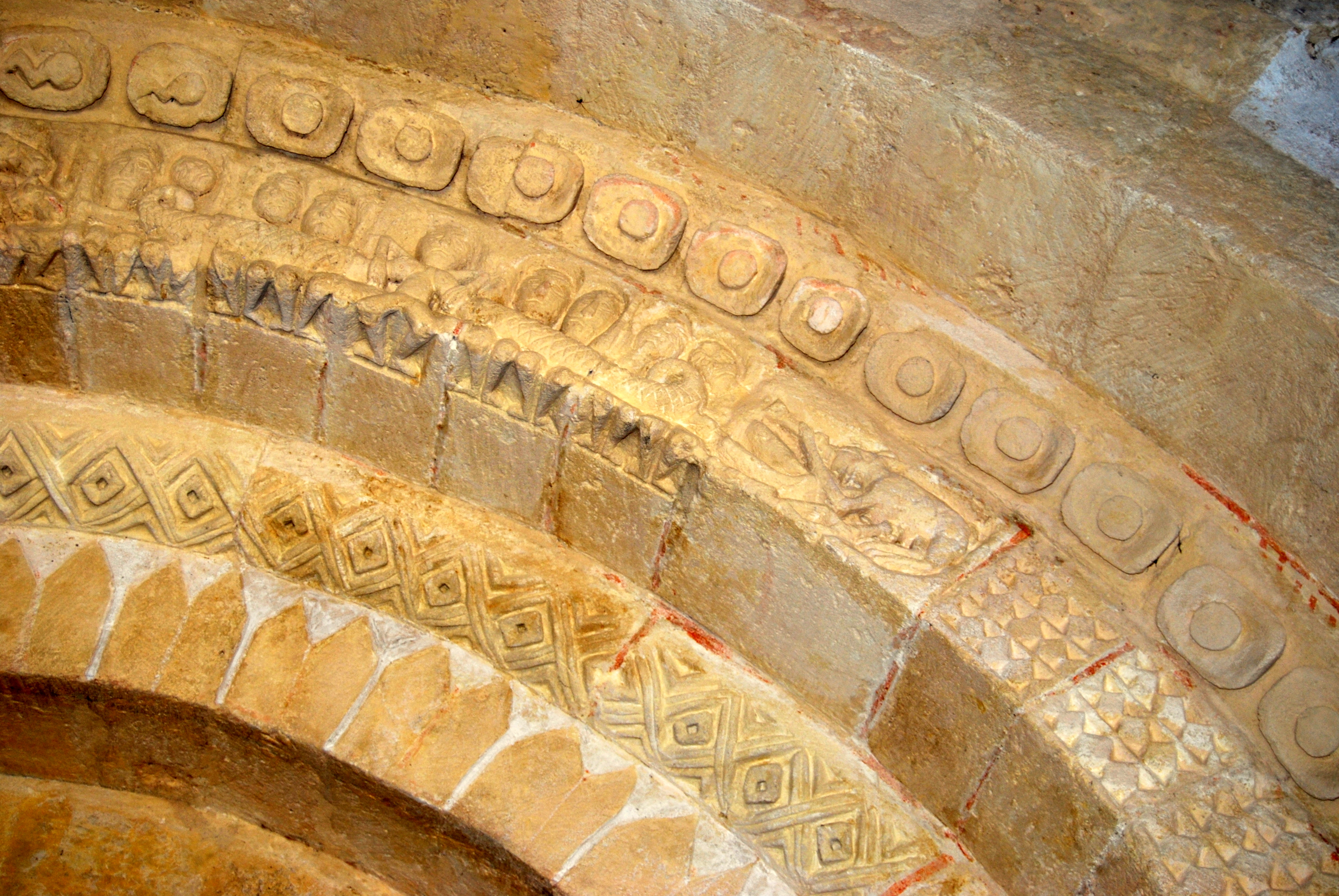 Pompignac église St Martin